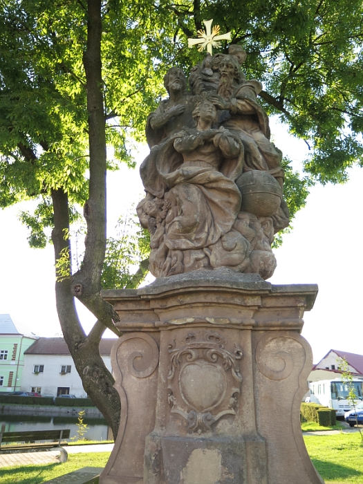 Sousoší Korunování Panny Marie, severní část návsi, Chotětov.